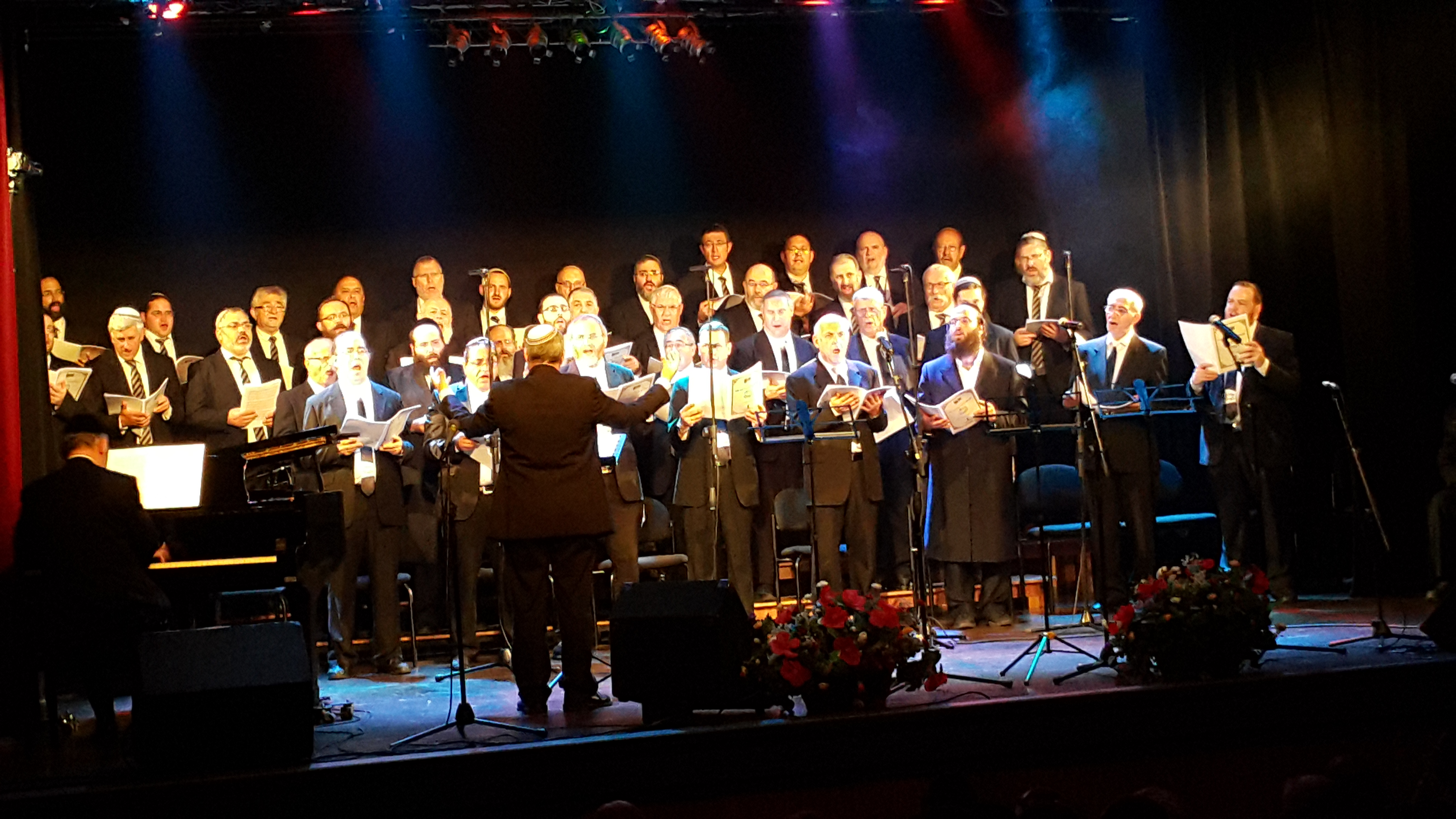 מופע מקהלת חזנות